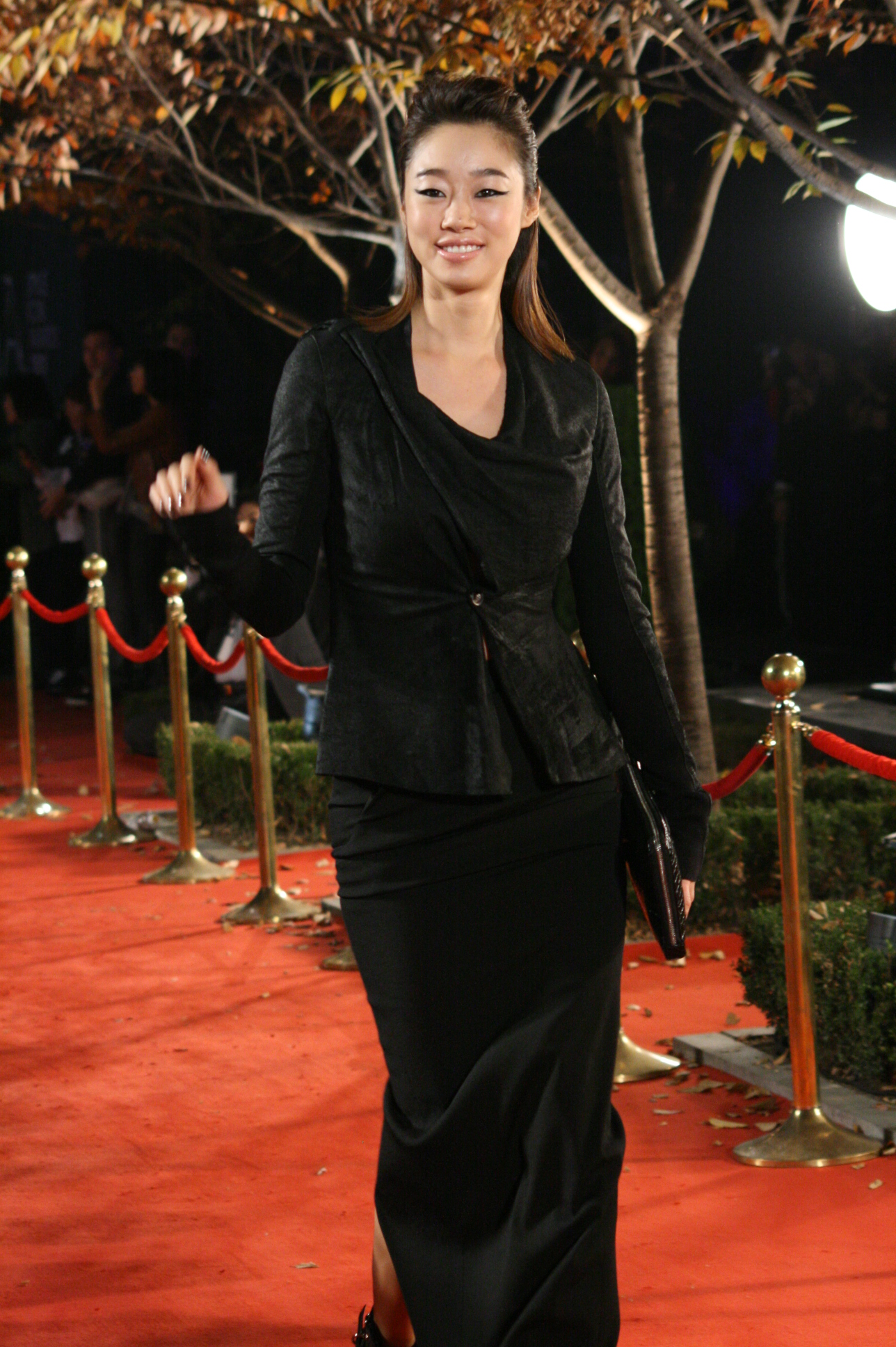 011인디브랜드페어&2011스타일아이콘어워즈 1452